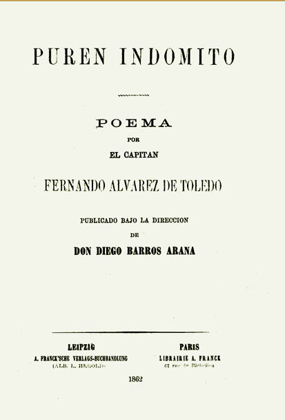 Digitalización de la portada de la primera edición del poema y crónica de Indias de principios del siglo XVII "Purén Indómito", atribuído a Diego Arias Saavedra. Desde mediados del siglo XX existe consenso en que erró esta primera edición al consignar como autor a Fernando Álvarez de Toledo. Esta primera edición se publicó en 1861 por A. Franck'sche Verlags Buchhandlung, Leipzig, estando a cargo y siendo iniciativa del investigador chileno Diego Barros Arana.